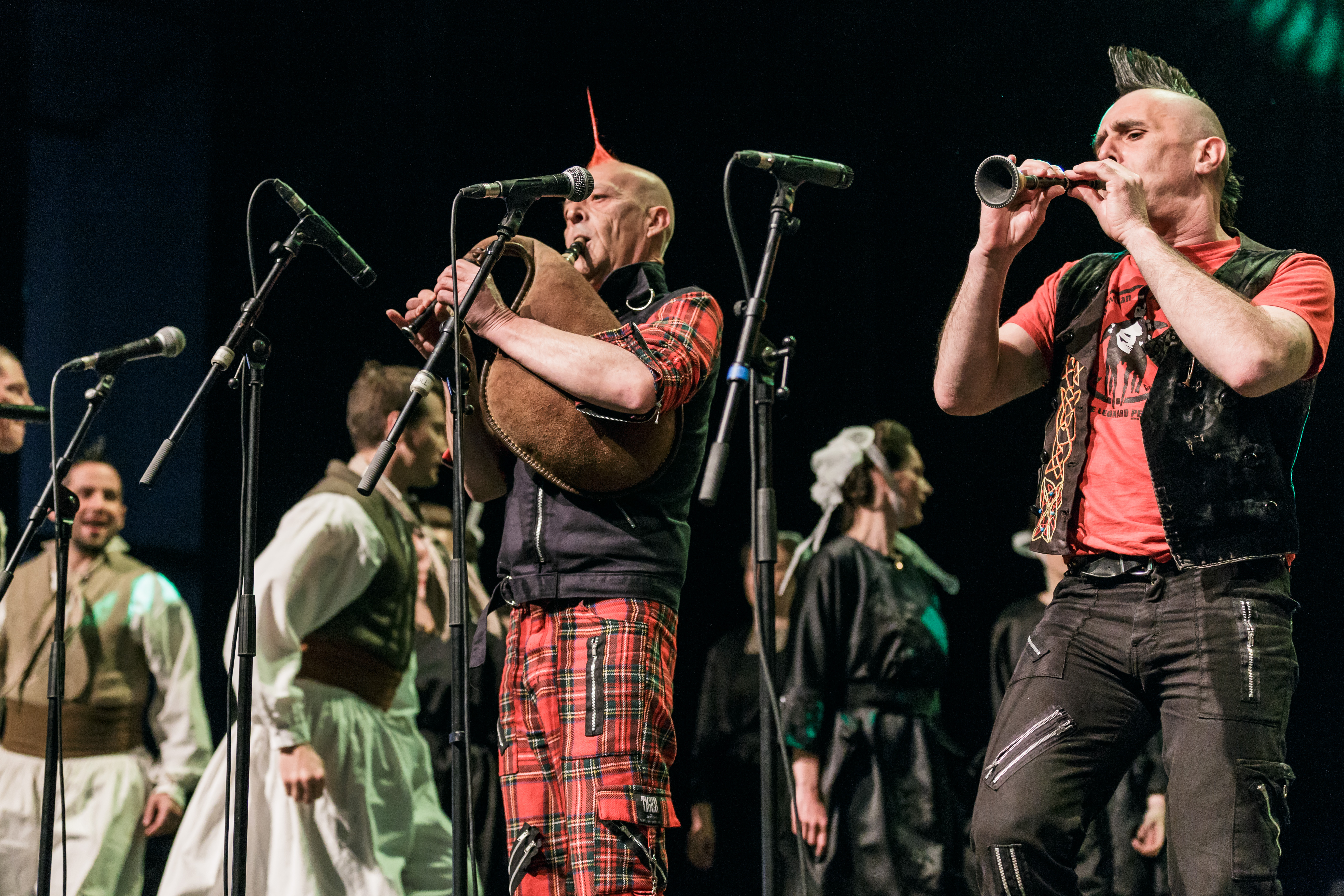 Les Ramoneurs de menhirs avec Louise Ebrel et le cercle celtique Quic-en-Groigne en fest-noz au parc des expos de Penvillers à Quimper à l'occasion des 50 ans de la confédération des cercles War'l Leur le 29 avril 2017.